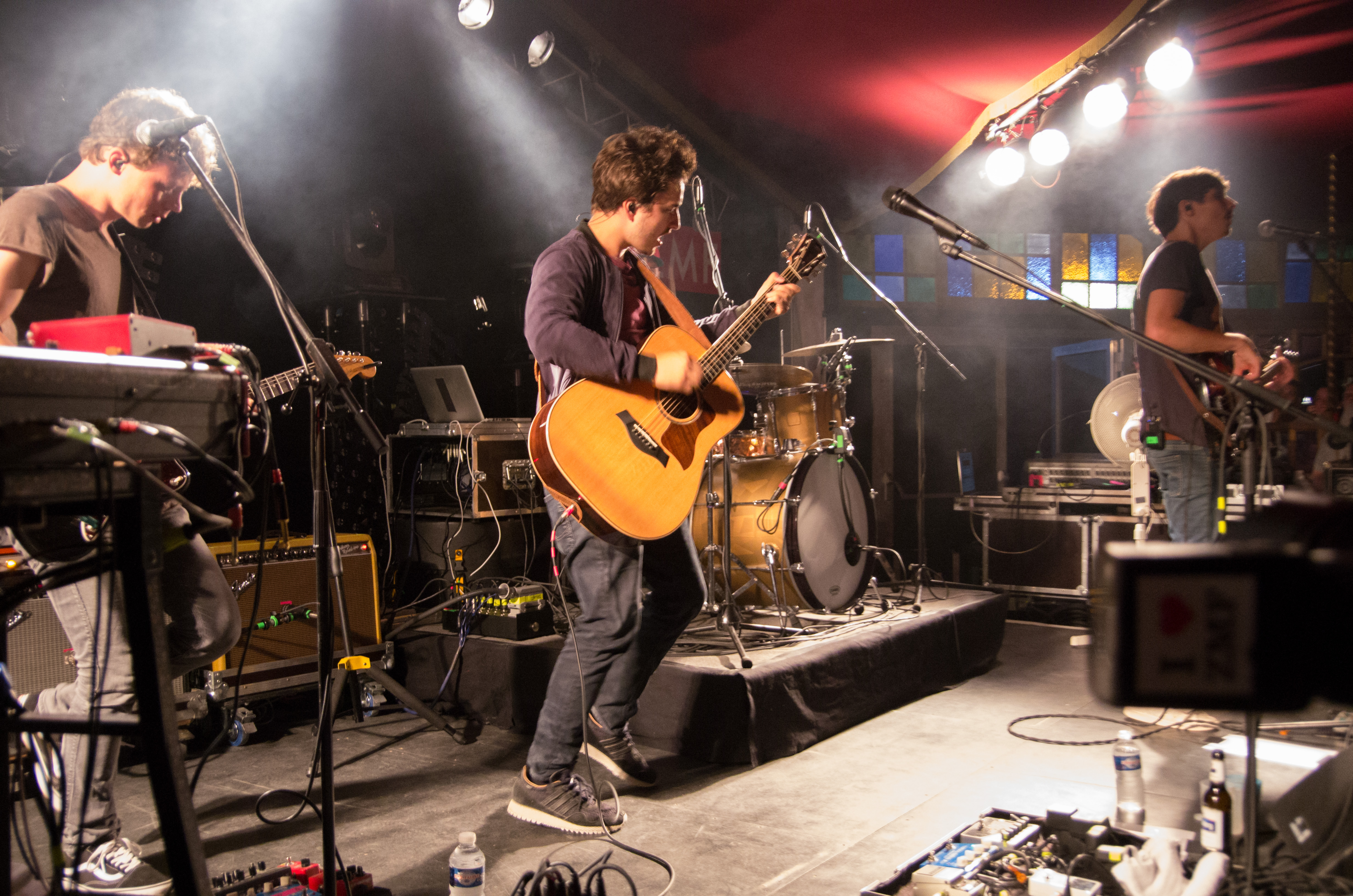 Das Zelt-Musik-Festival 2016 in Freiburg im Breisgau 21.07.2016 Philipp Dittberner & Band